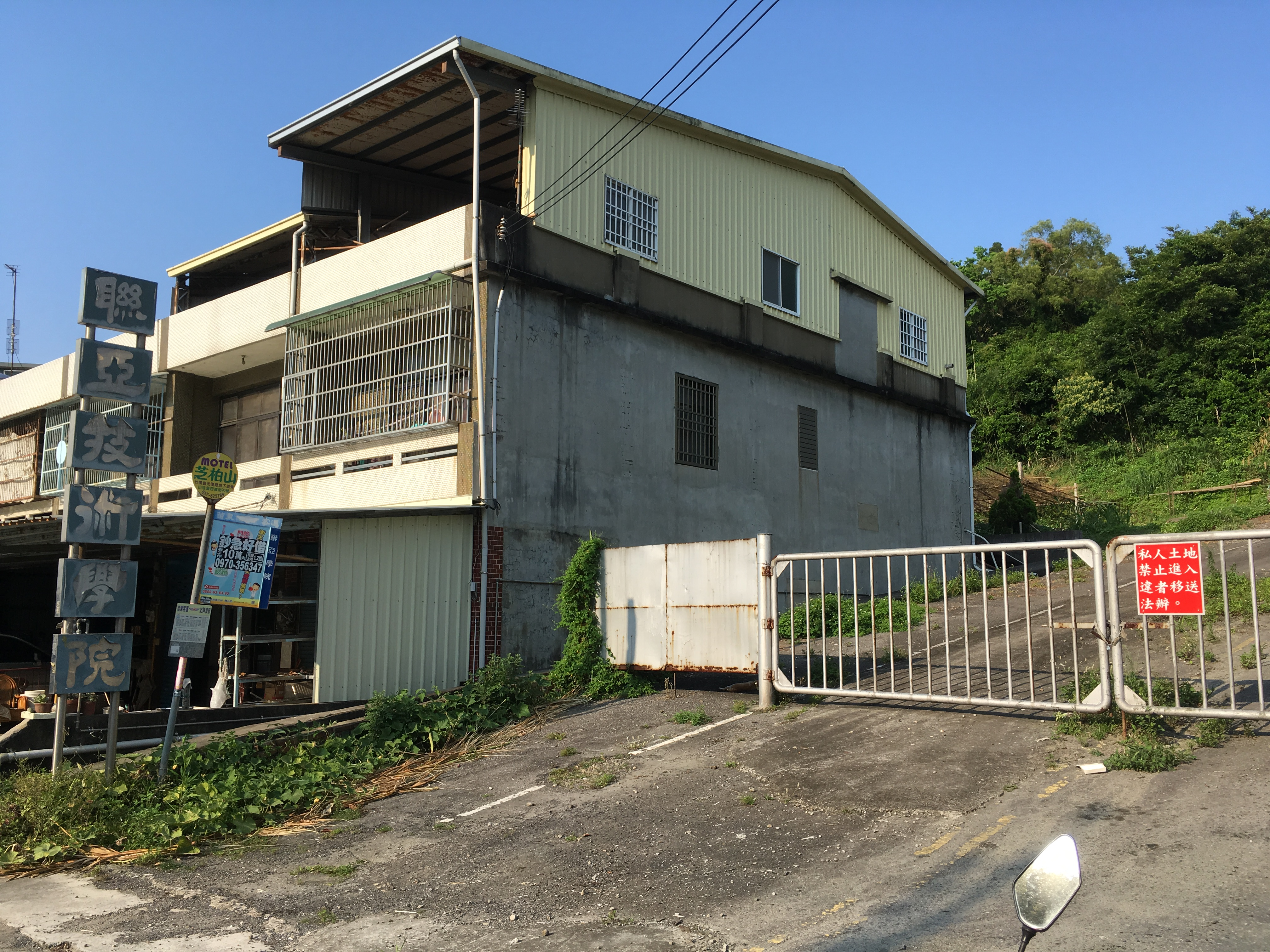 中文（台灣）: 聯亞技術學院舊址，位於苗栗縣造橋鄉，最左方為校名立牌與苗栗客運「聯亞學院」站牌。